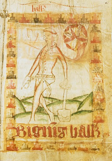 Byggninga-balken ur Magnus Erikssons landslag